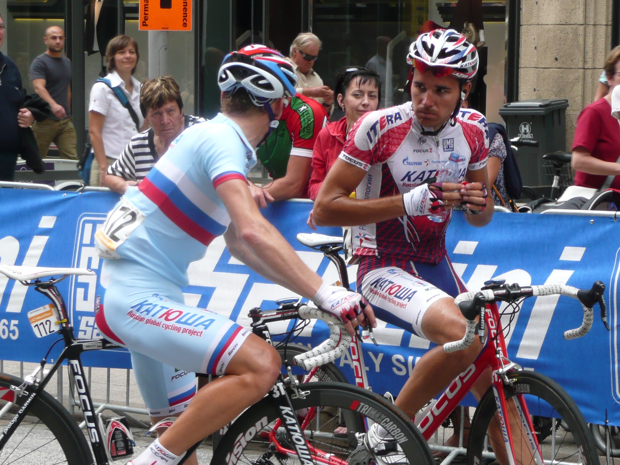 Vattenfall Cyclassics 2011, die Fahrer des Team Katjuscha Pavel Brutt und Nikolai Trussow nach der Zielankunft